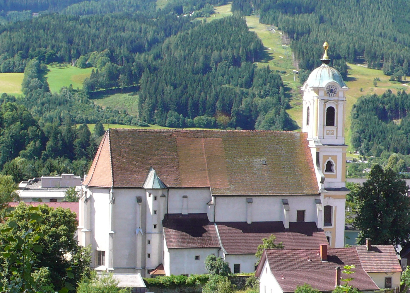 Kath. Pfarrkirche hl. Nikolaus in Mautern, Bezirk Leoben, Steiermark, Österreich